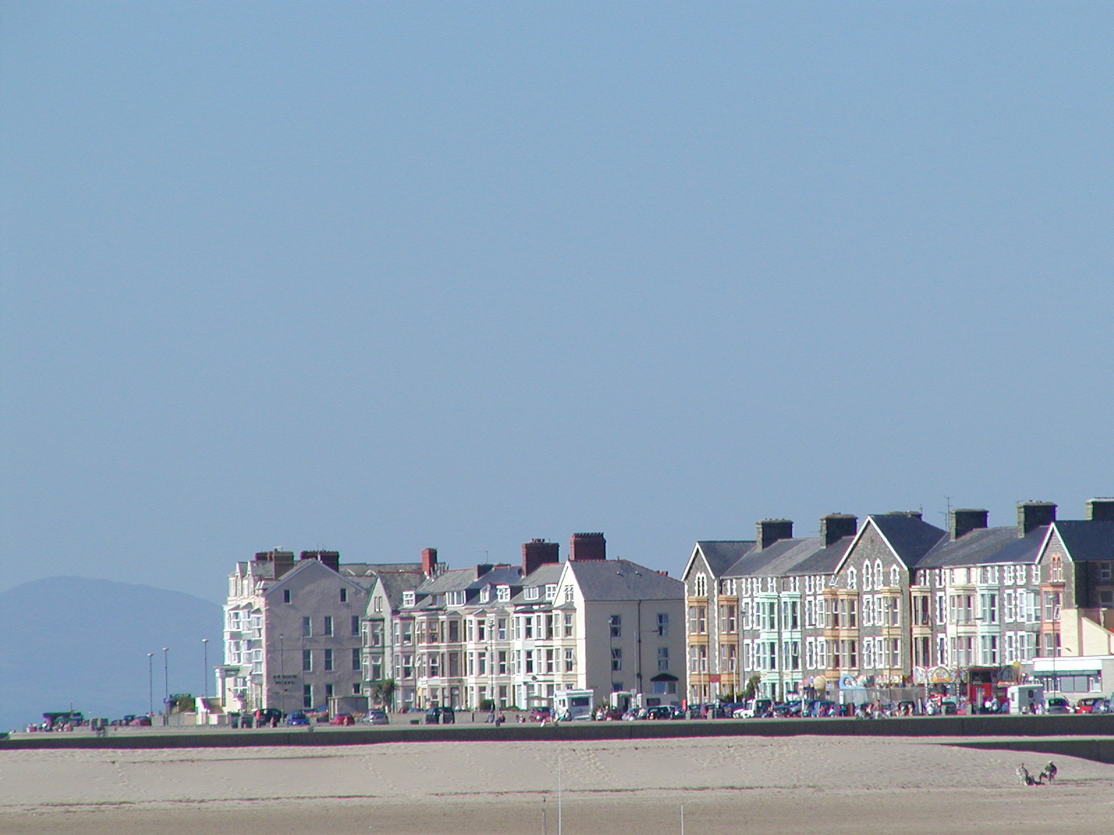 Bermo o Ffriog